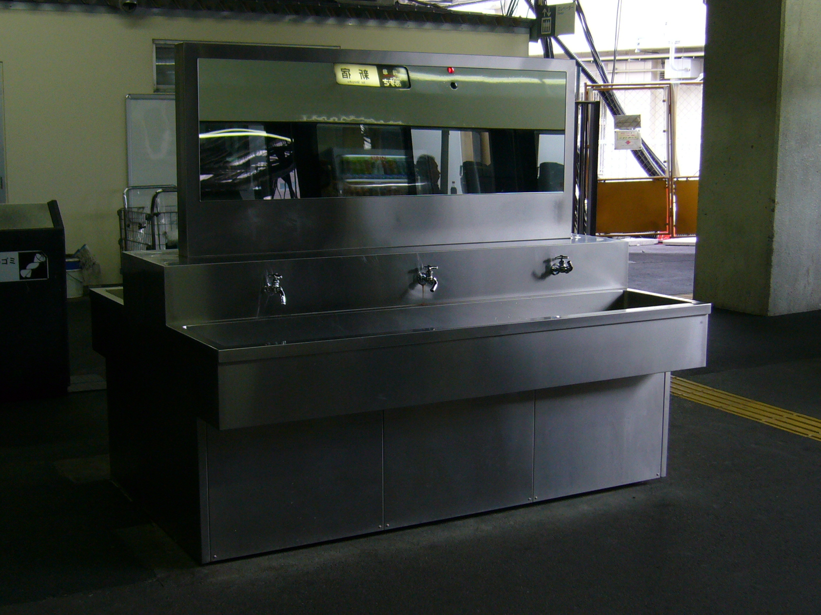 washbasin,matsumoto-station,japan